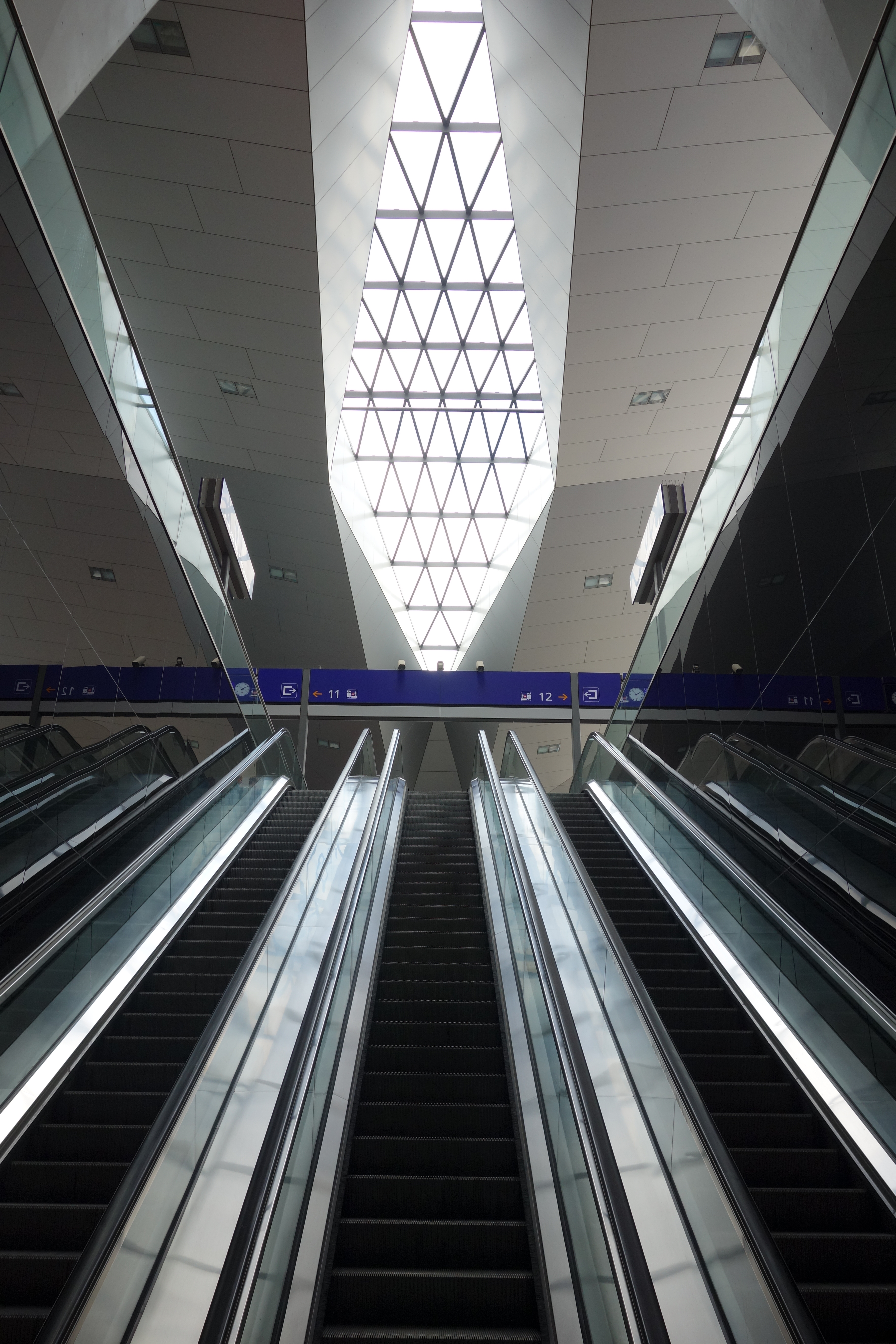 Aufgang zu den Bahnsteigen 11 und 12 am Wiener Hauptbahnhof im Juni 2014.